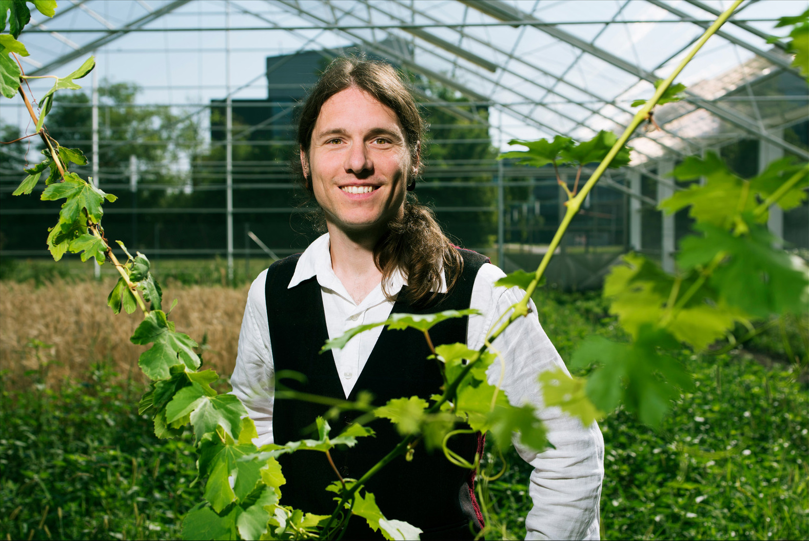 Clemens G. Arvay, österreichischer Biologe und Buchautor